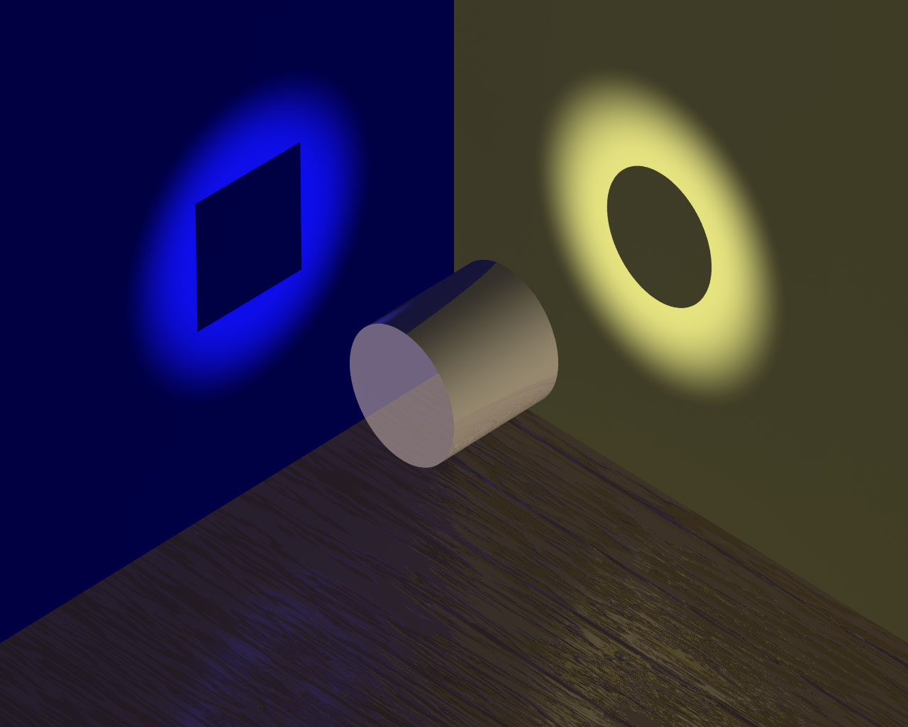 Pour illustrer la dualité onde/corpuscule (par exemple)